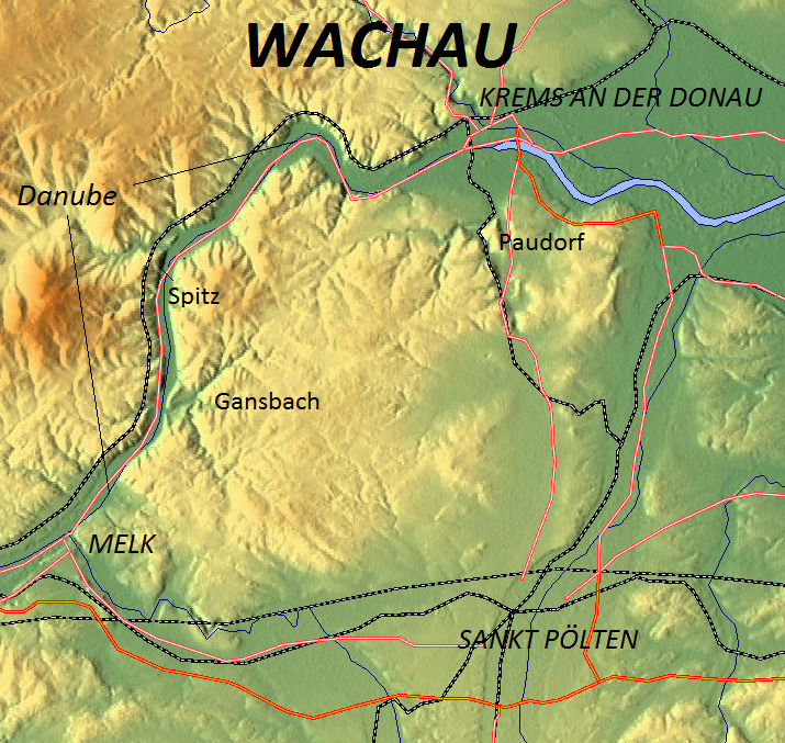 Relief map of Wachau valley